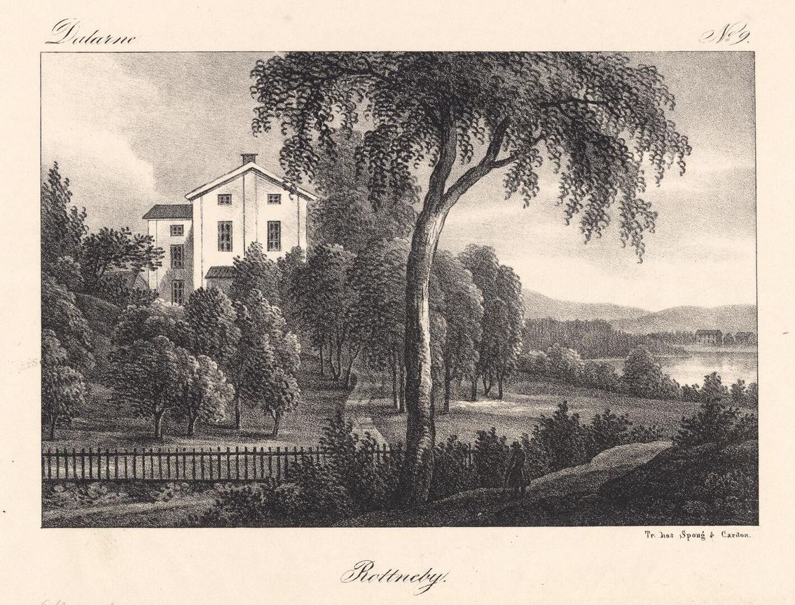 Litografi tyckt hos Spong & Cardon. - Ur: Sverige framstäldt i teckningar. 224 litografier. Med text af G. H. Mellin. Sthlm 1836-40.